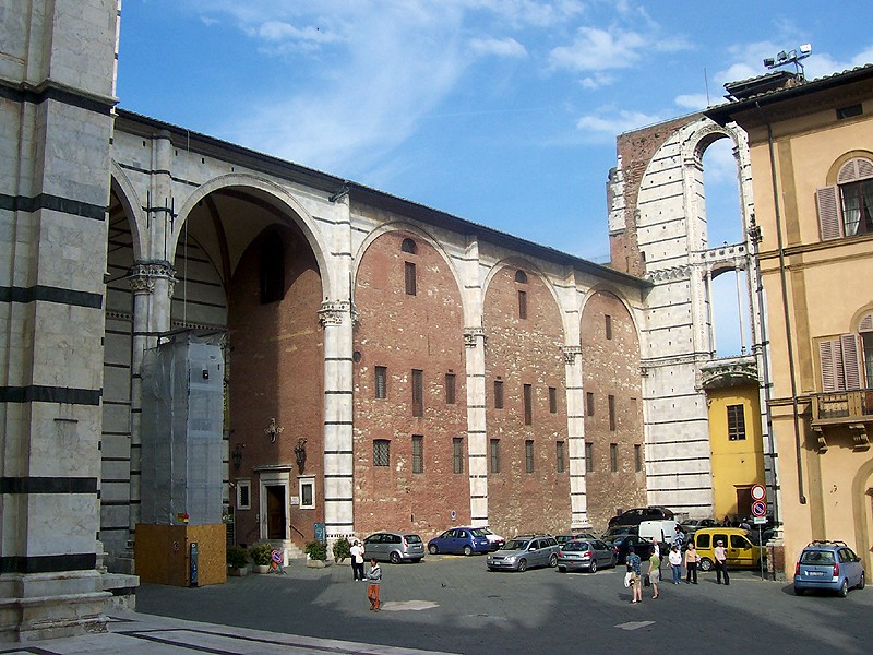 Siena - Museo dell'Opera Metropolitana